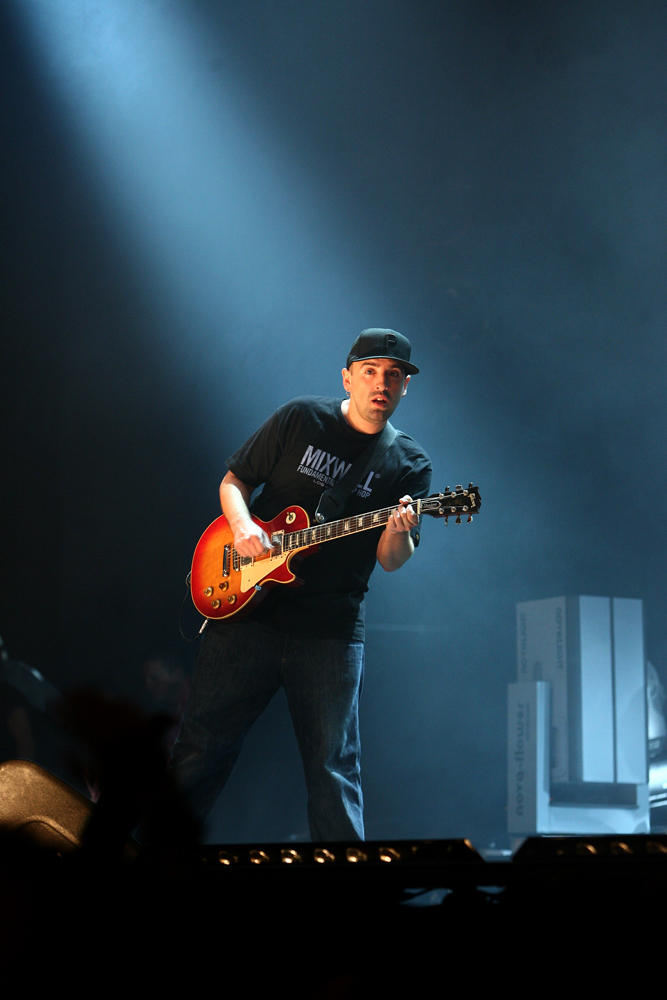 Quaresma. Concerto no Pavilhão Atlântico dos Da Weasel 10 de Novembro 2007